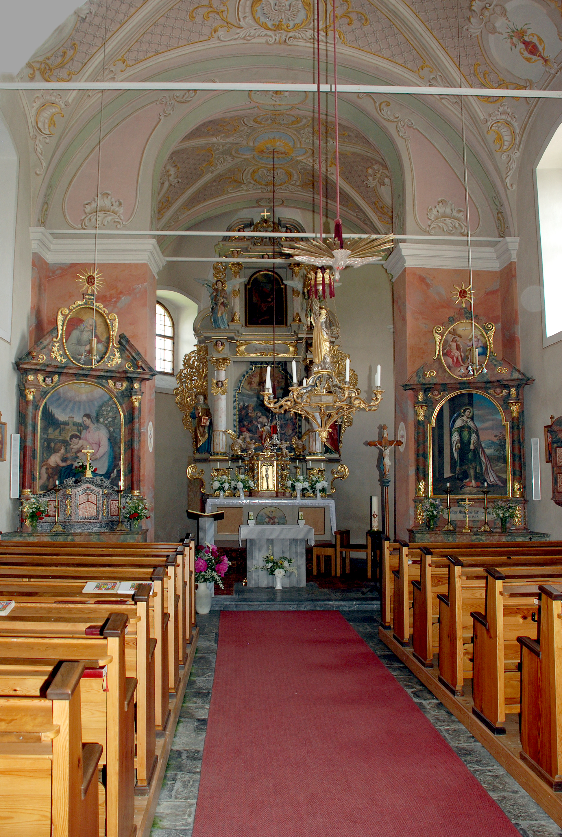 Aibl, Steiermark, Österreich: St. Lorenzen Pfarrkirche innen